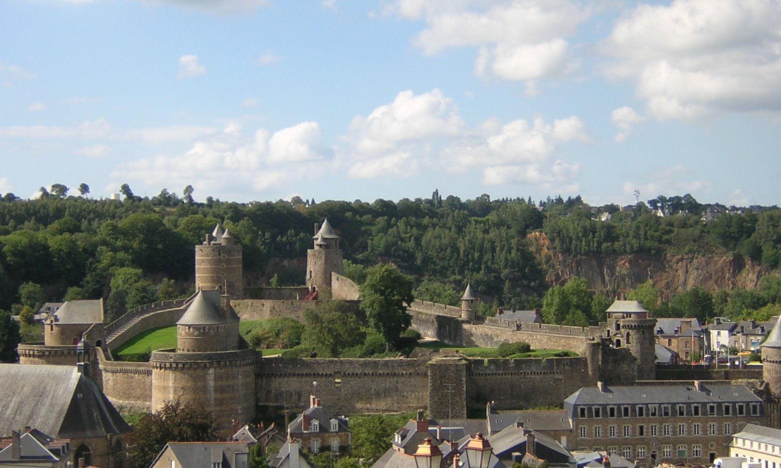 Château de Fougères : vue générale des Quatre Moulins. Ille-et-Vilaine (35) France.